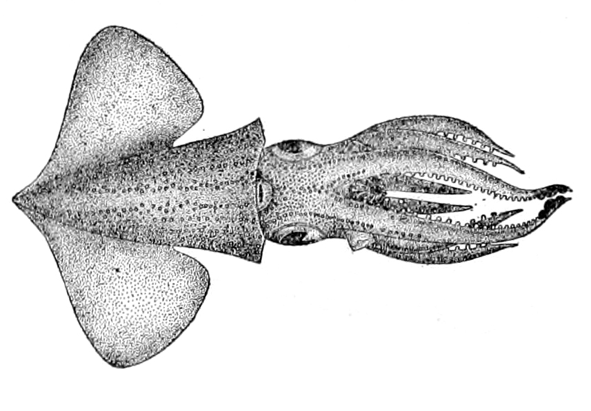 Abraliopsis